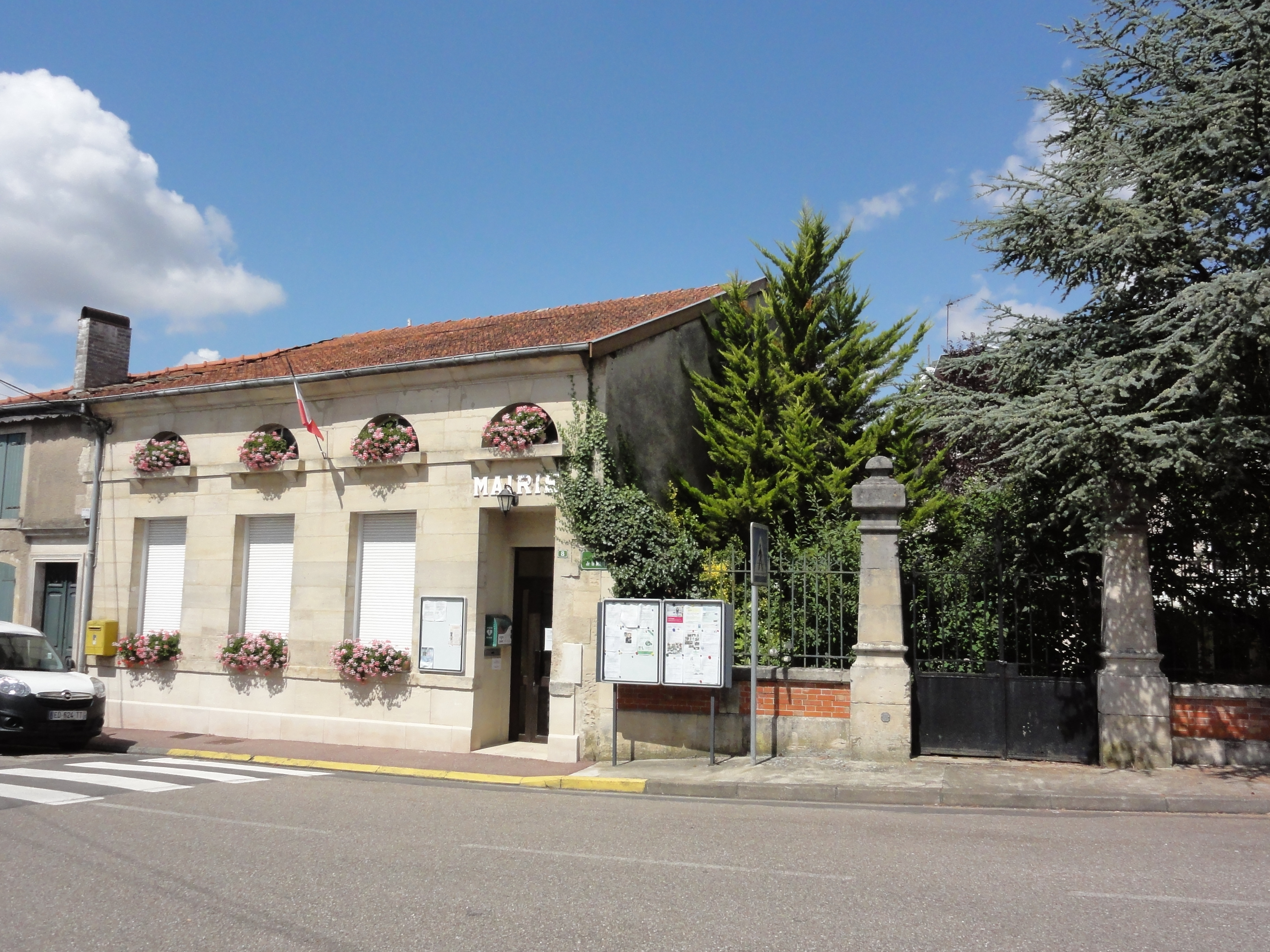 Behonne (Meuse) mairie